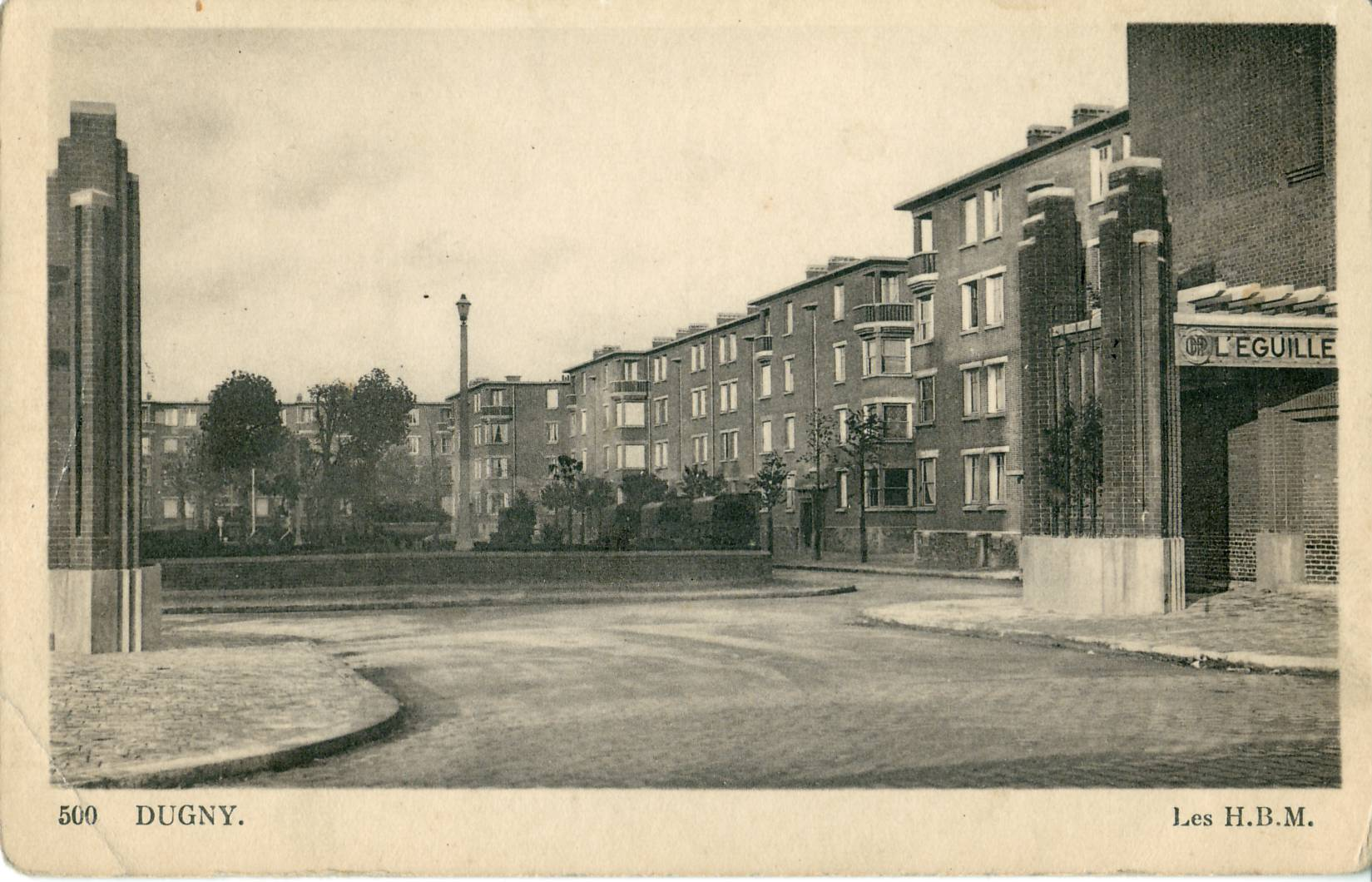 Carte postale ancienne éditée par Godeneff, N°500 DUGNY : Les HBM La cité de l'Eguillez a été édifiée en 1932 par les architectes Georges Albenque et Eugène Gonnot pour l'Office public d'HBM de la Seine